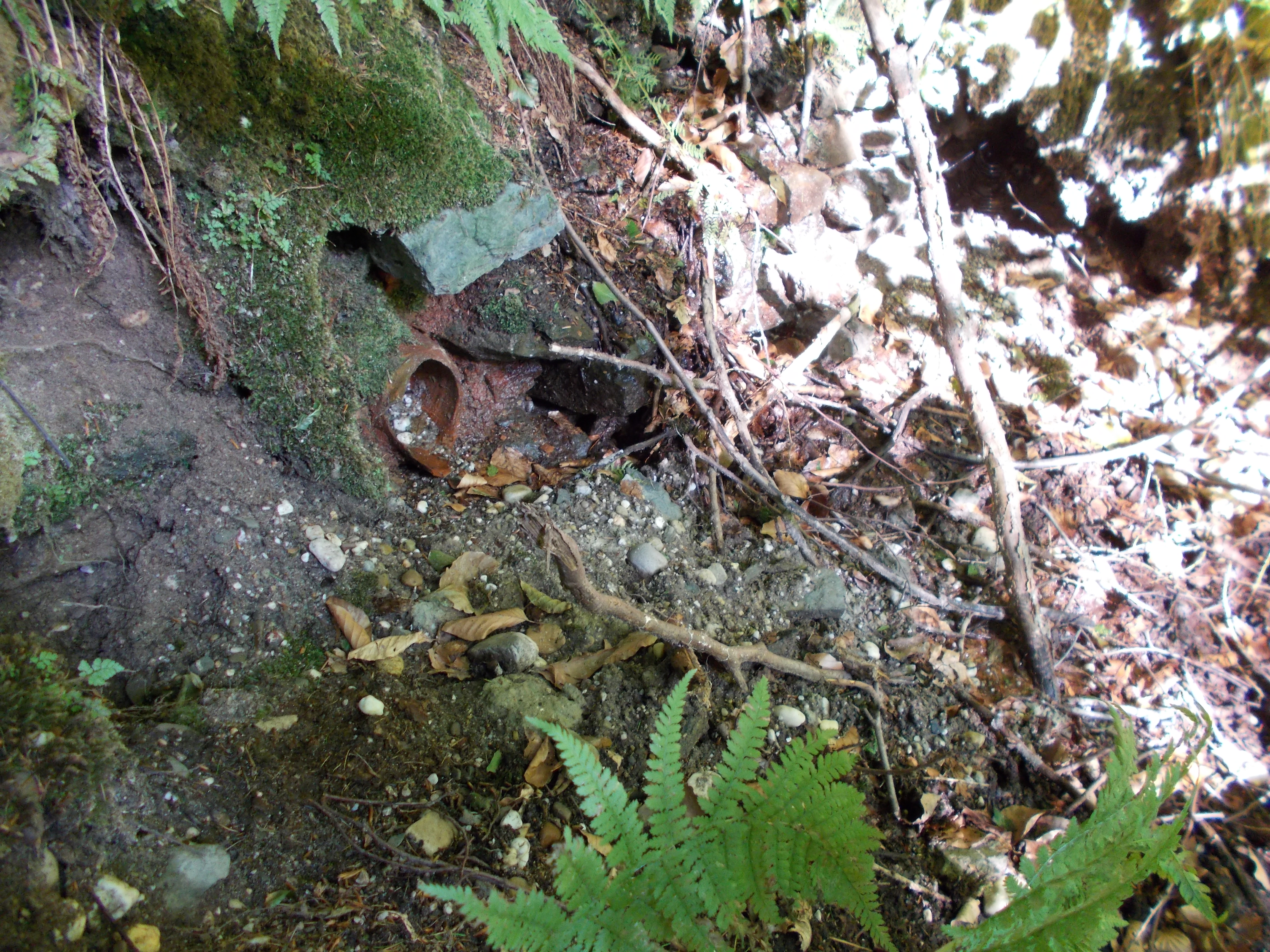 Quellaustritt Naturdenkmal "Drususquelle" mit Ziegelrohr am Hang des Flirenberges in der Hees, Er befindet sich ca. 3 Meter oberhalb des Brunnens und ist von einer überwachsenen Trockenmauer umgeben. ND 4 Sonsbeck / Xanten (Kreis Wesel).